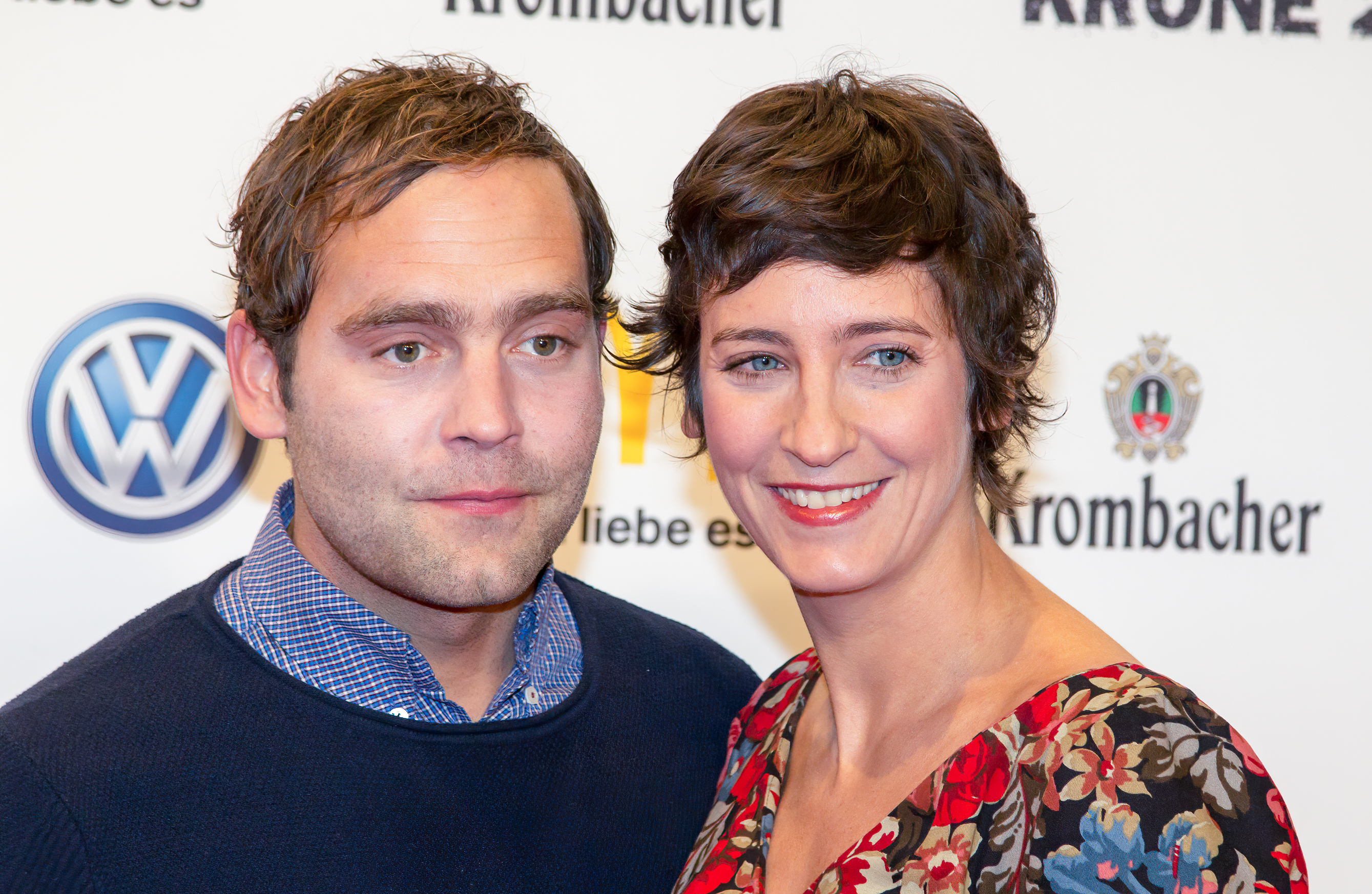 1LIVE Krone 2014 in der Bochumer Jahrhunderthalle: Axel und Ayse Bosse auf dem roten Teppich